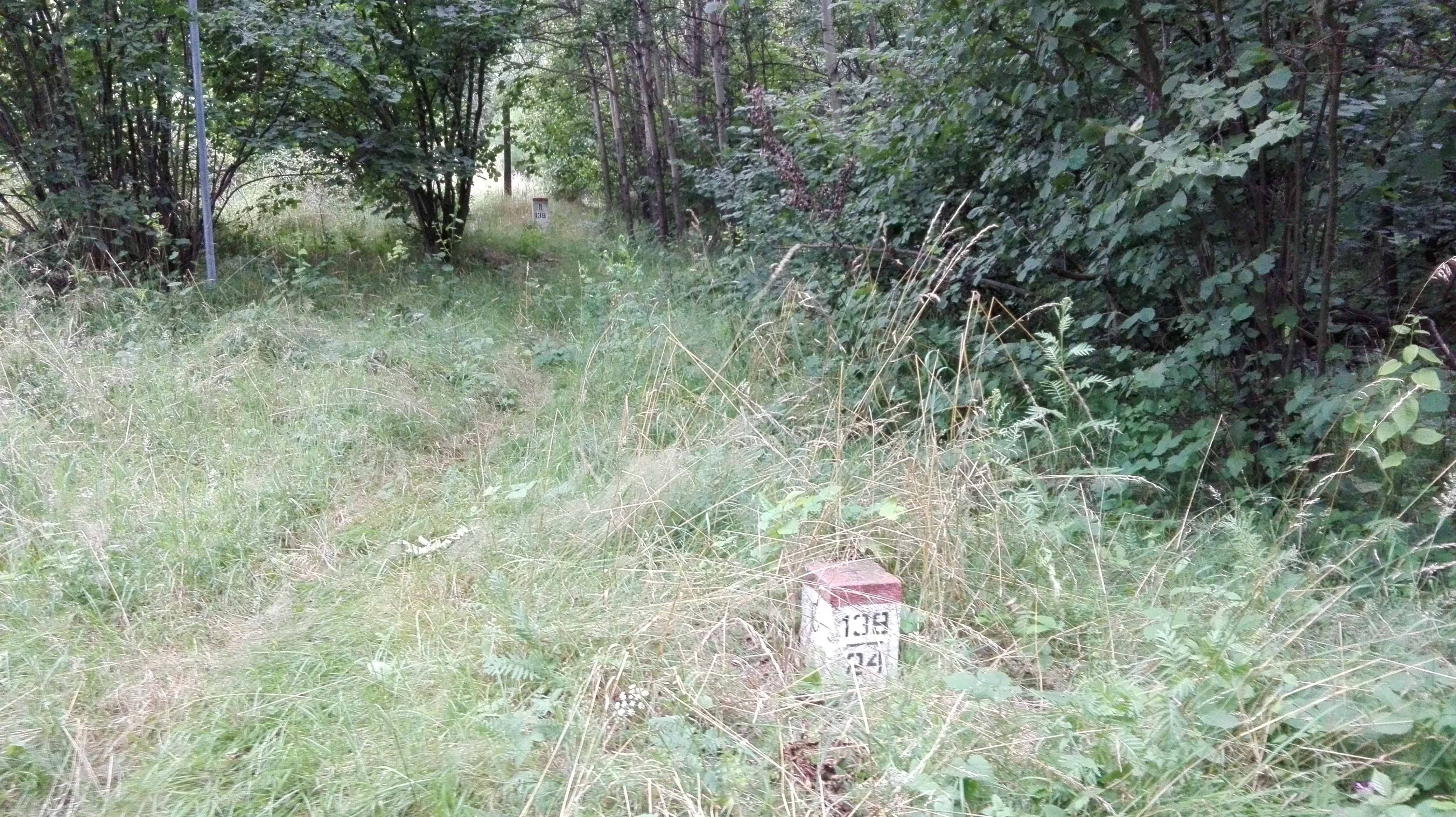 Granica polsko-czeska, znak graniczny nr 139/24